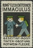 Werbemarke von Clara Möller-Coburg, ca. 1908